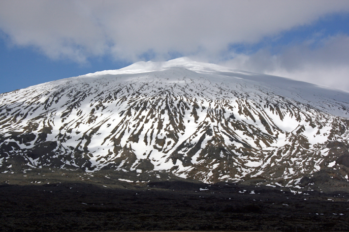 Snæfellsjökull